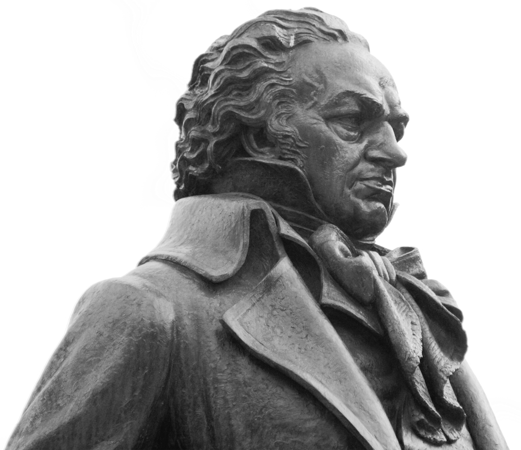 Busto de Francisco de Goya